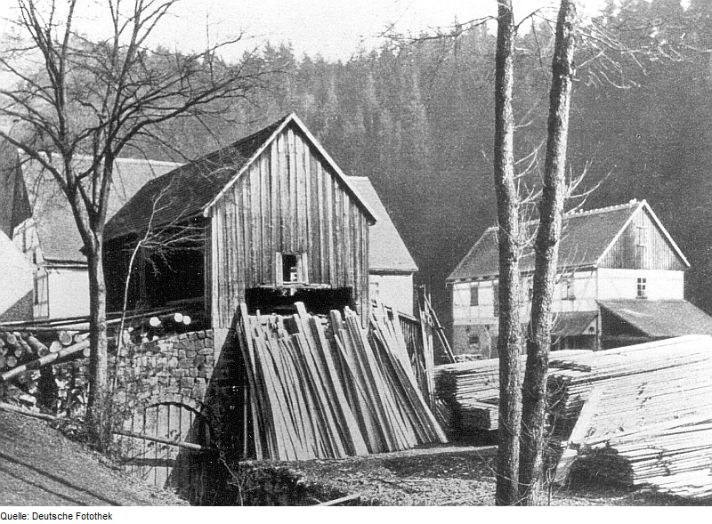 Original image description from the Deutsche Fotothek Stolpen-Heeselicht. Heeselichtmühle im Polenztal, aus: Sächs. Heimatschutz, Bd. 25, 1936